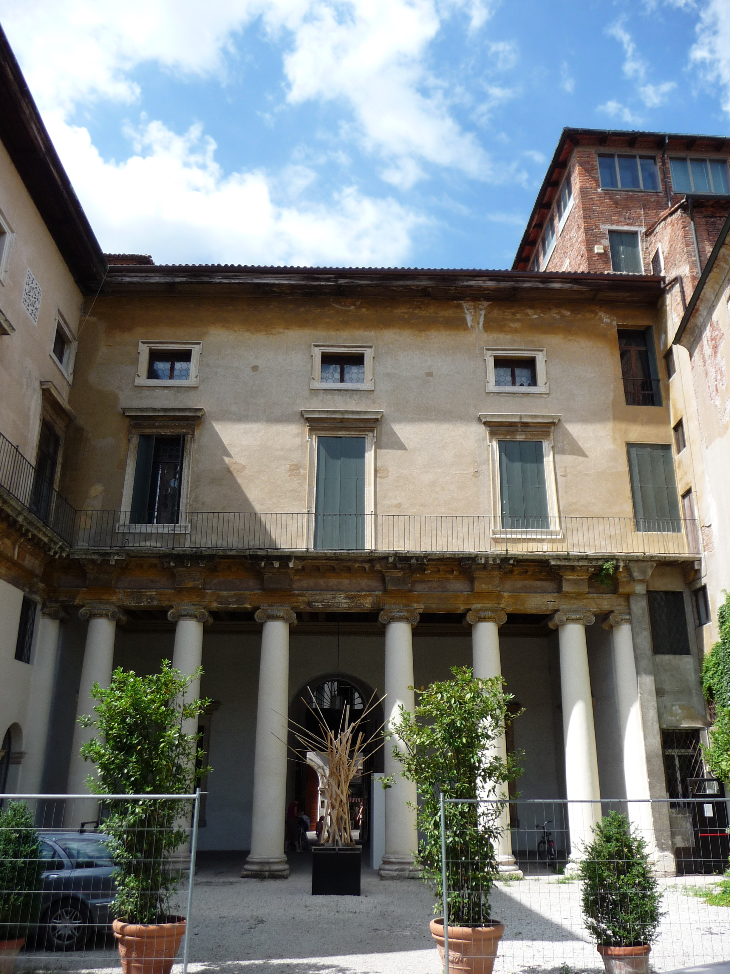 Facciata posteriore del palazzo, con loggia al piano terreno, vista dal cortile.